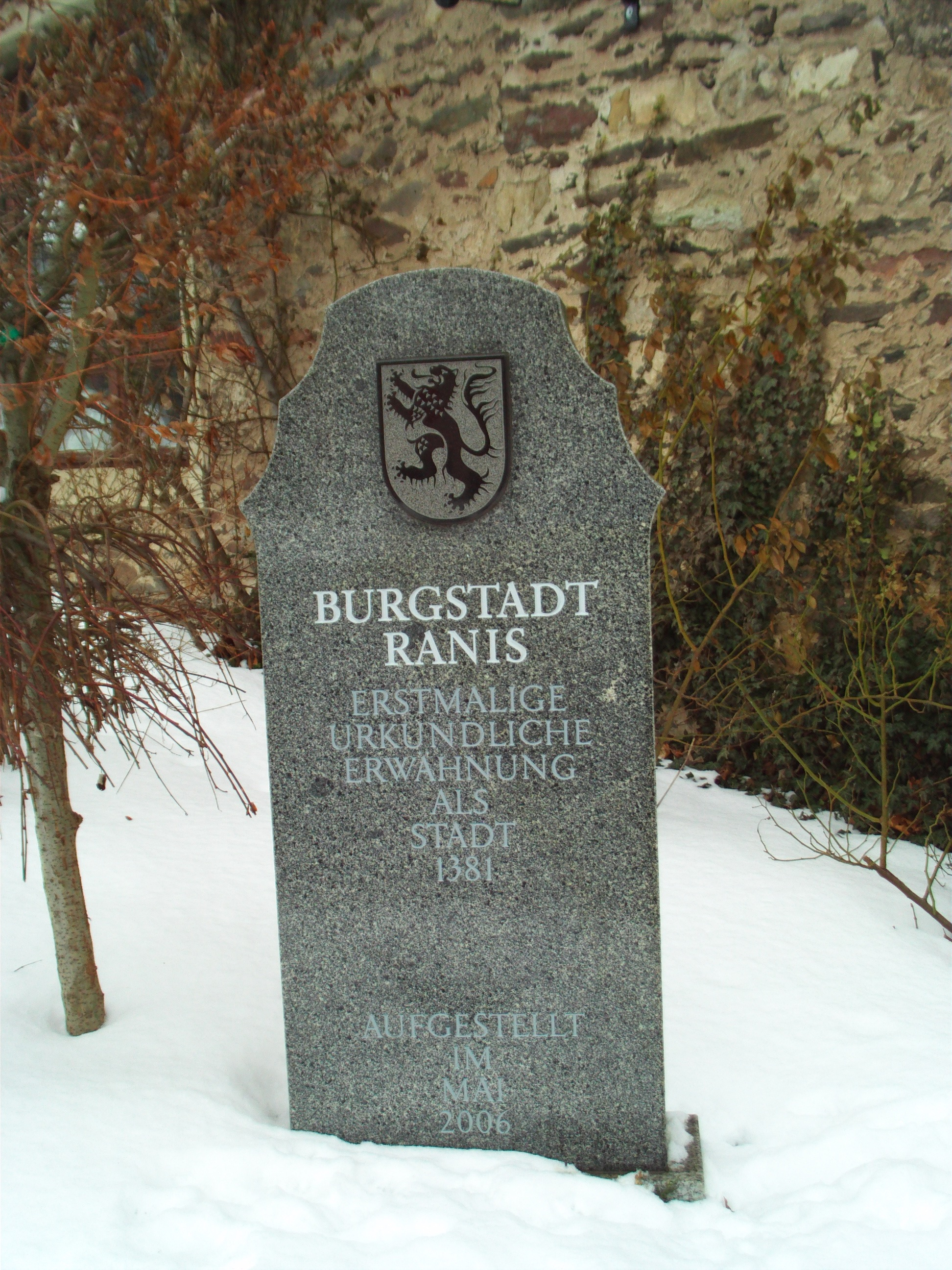 Gedenkstein zur erstmaligen urkundlichen Erwähnung der Burgstadt Ranis als Stadt 1381